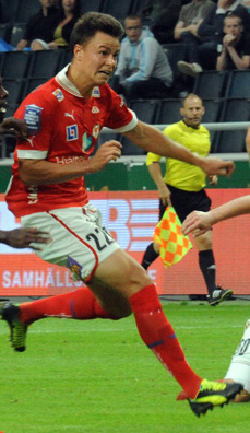 Melker Hallberg